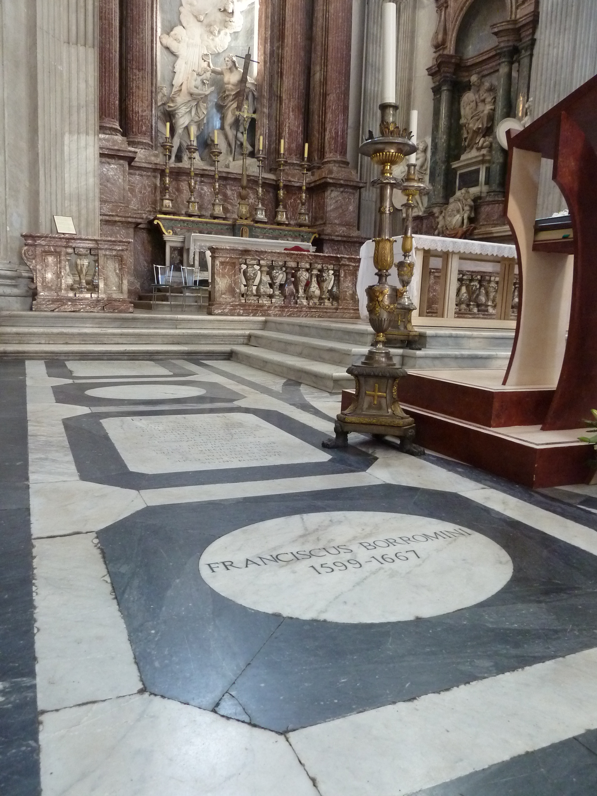 Lápida del arquitecto barroco Francesco Borromini, localizada en la iglesia de San Juan de los Florentinos, Roma.